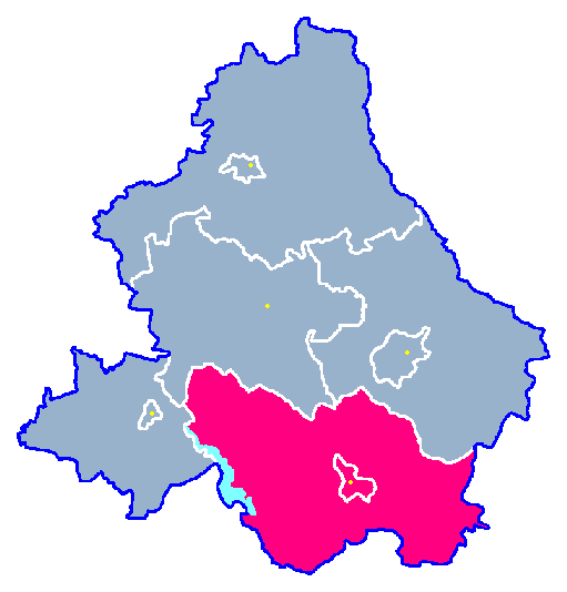 Locator maps for communes in województwo zachodniopomorskie : Węgorzyno gm.png (podział na gminy)